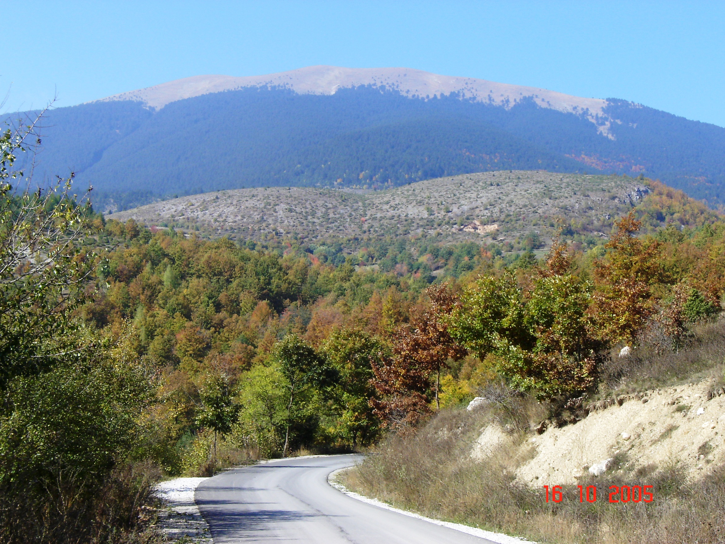 Pogled na Koritnik.